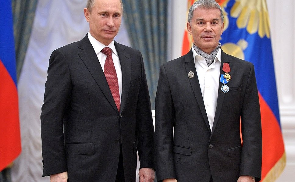 Церемония вручения государственных наград РФ. Орденом «За заслуги перед Отечеством» IV степени награждён певец Олег Газманов